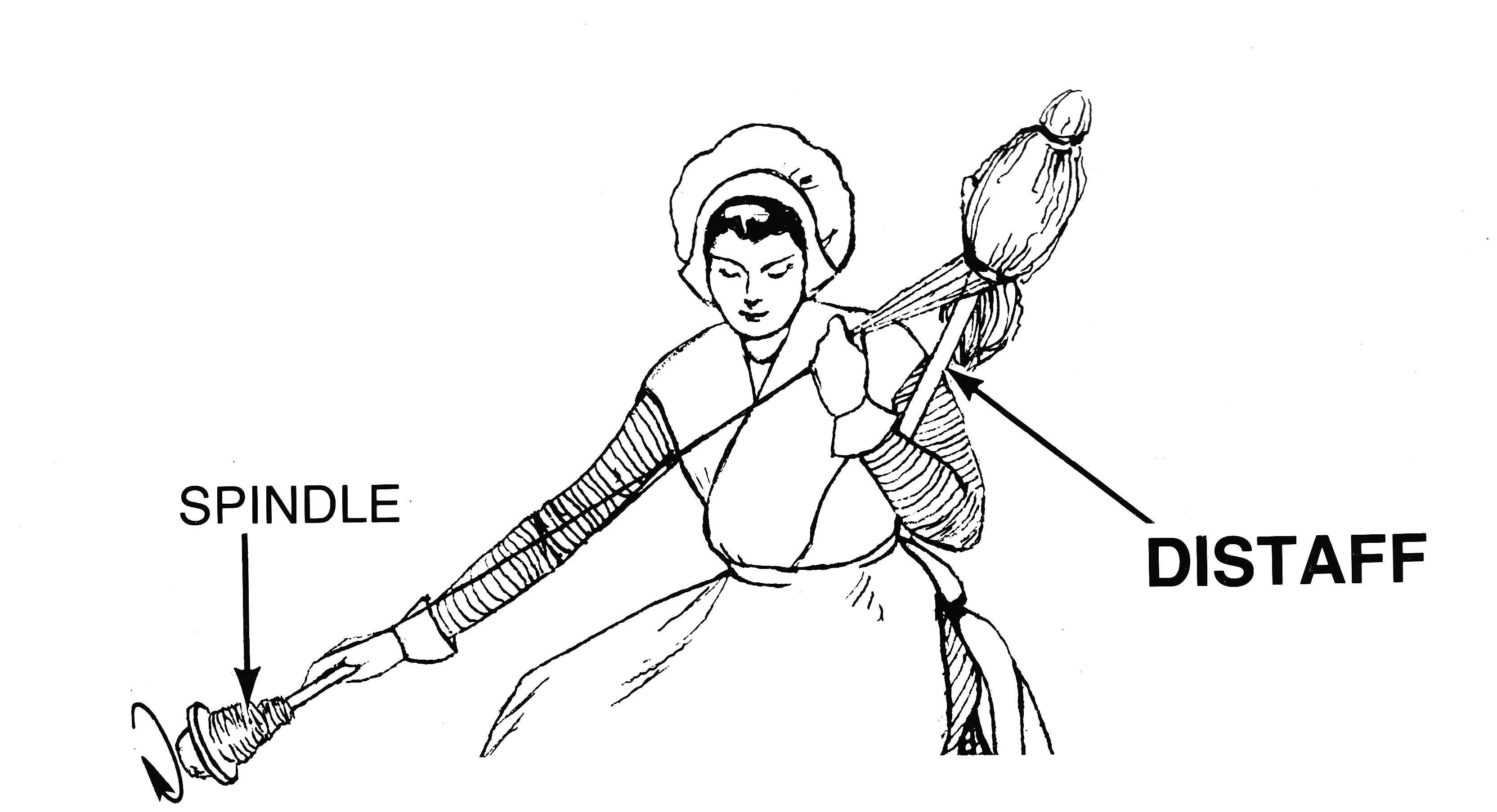 Distaff